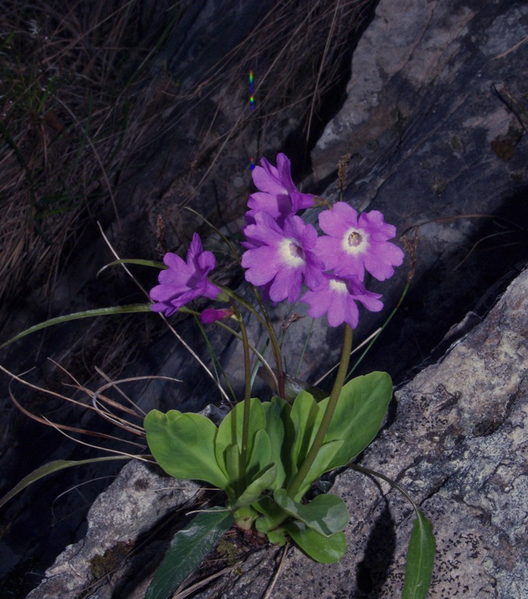 Kranjski jeglič (Primula carniolica)